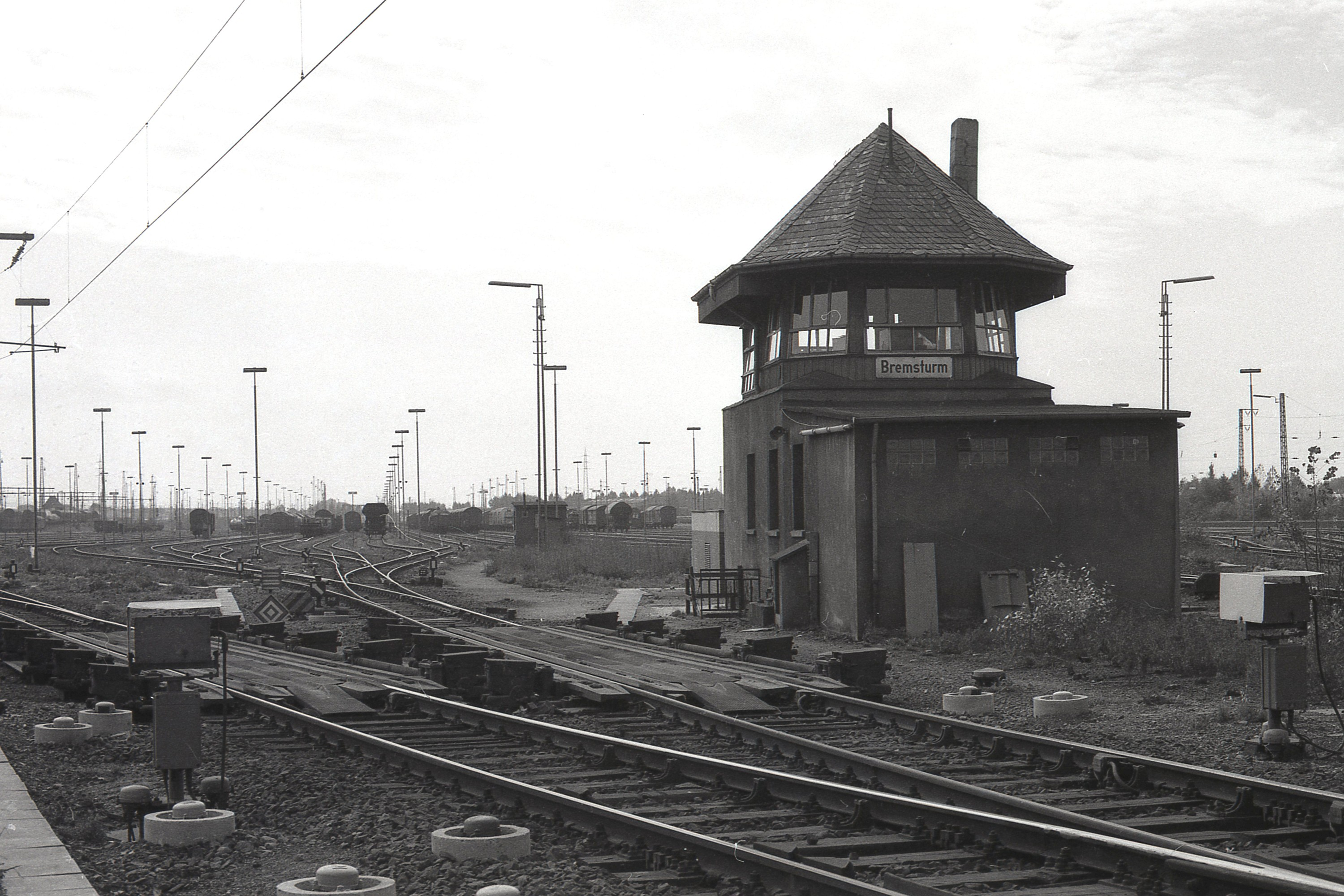 Bremsturm des Rangierbahnhofs Hamm/Westf.